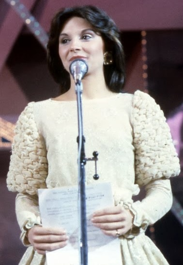 Festival di Sanremo 1982, la conduttrice Patrizia Rossetti